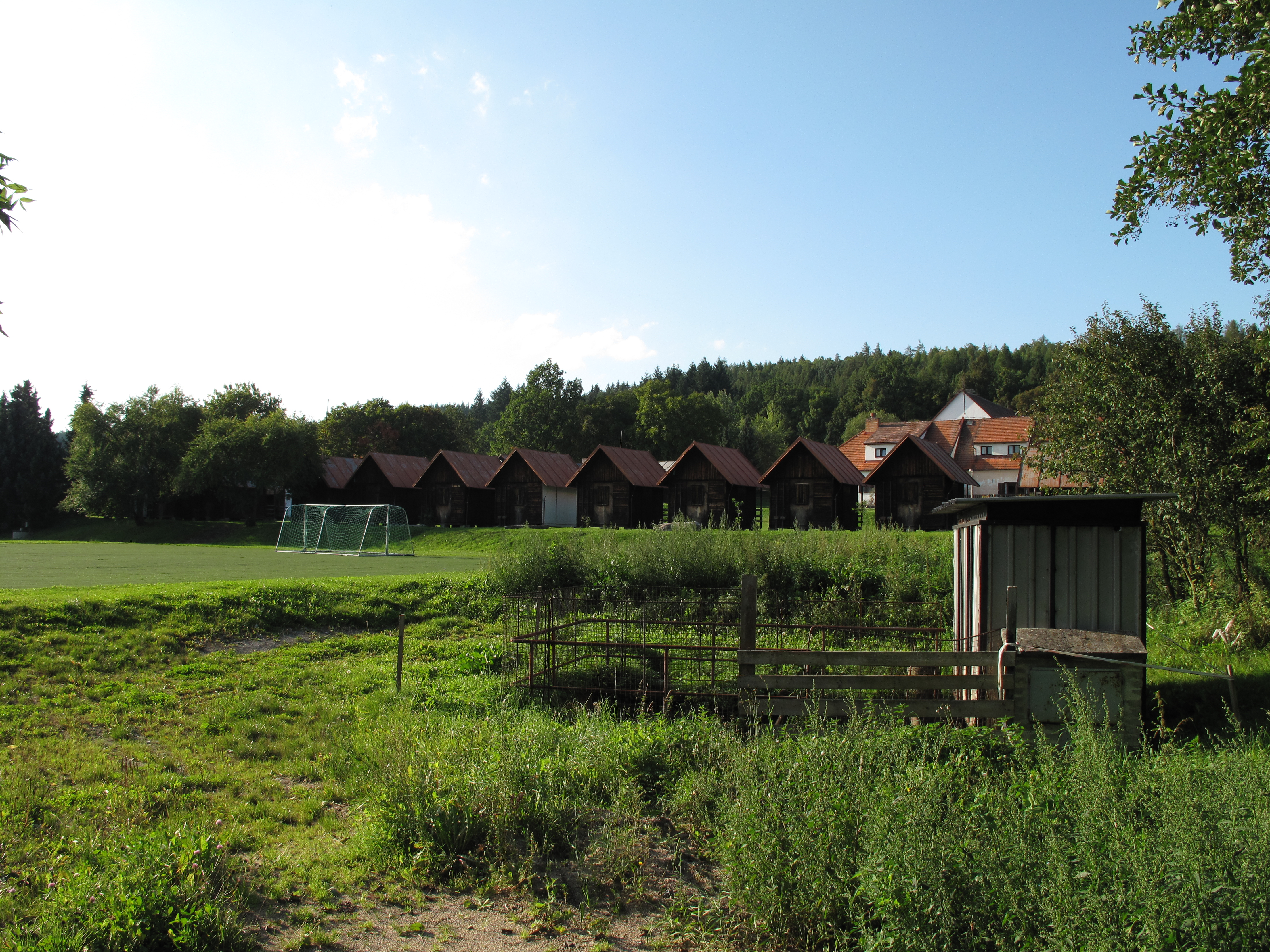 Rekreační chatky v Dolu. Okres Strakonice, Česká republika.